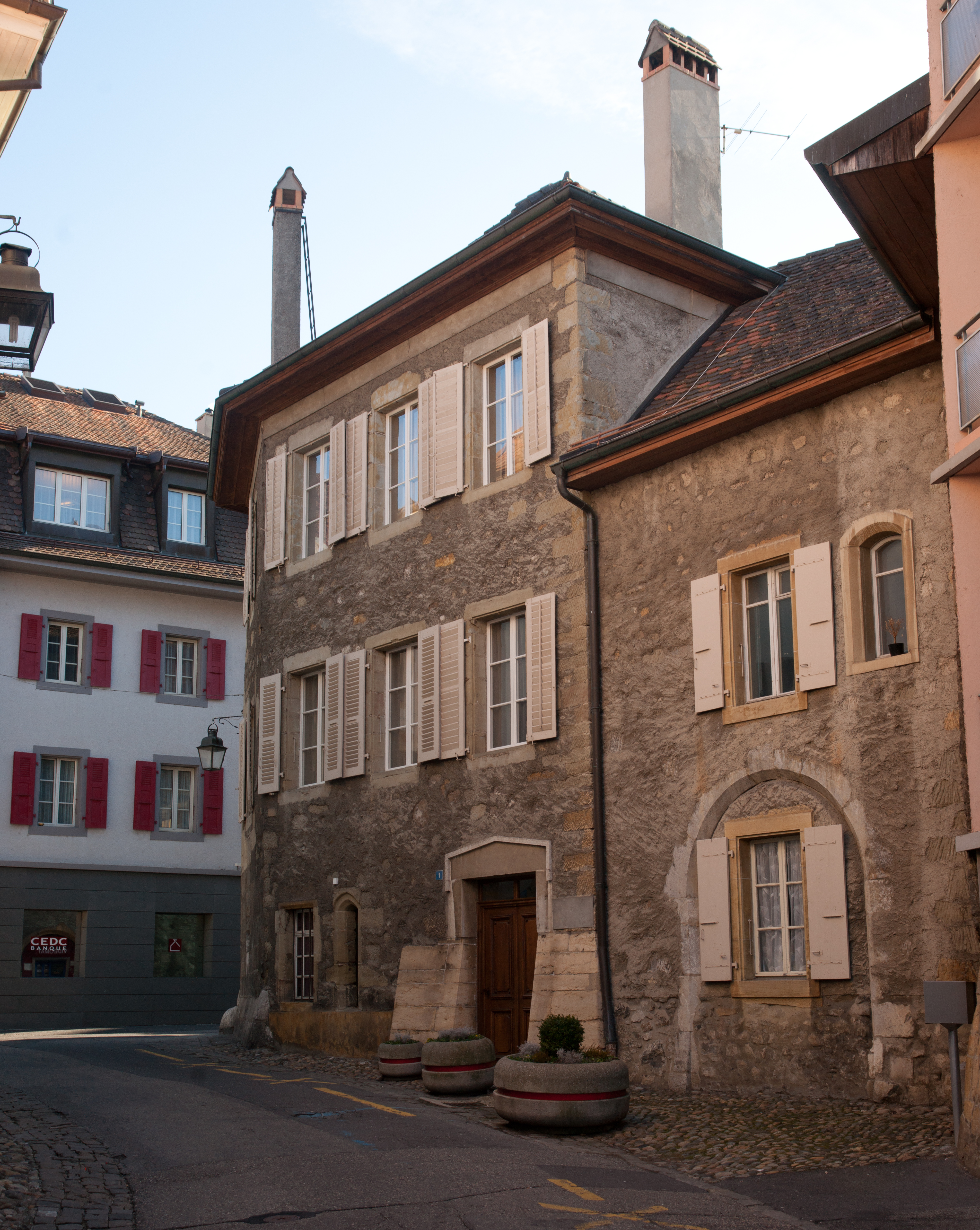 Vielle ville de Cossonay, canton de Vaud, Suisse.